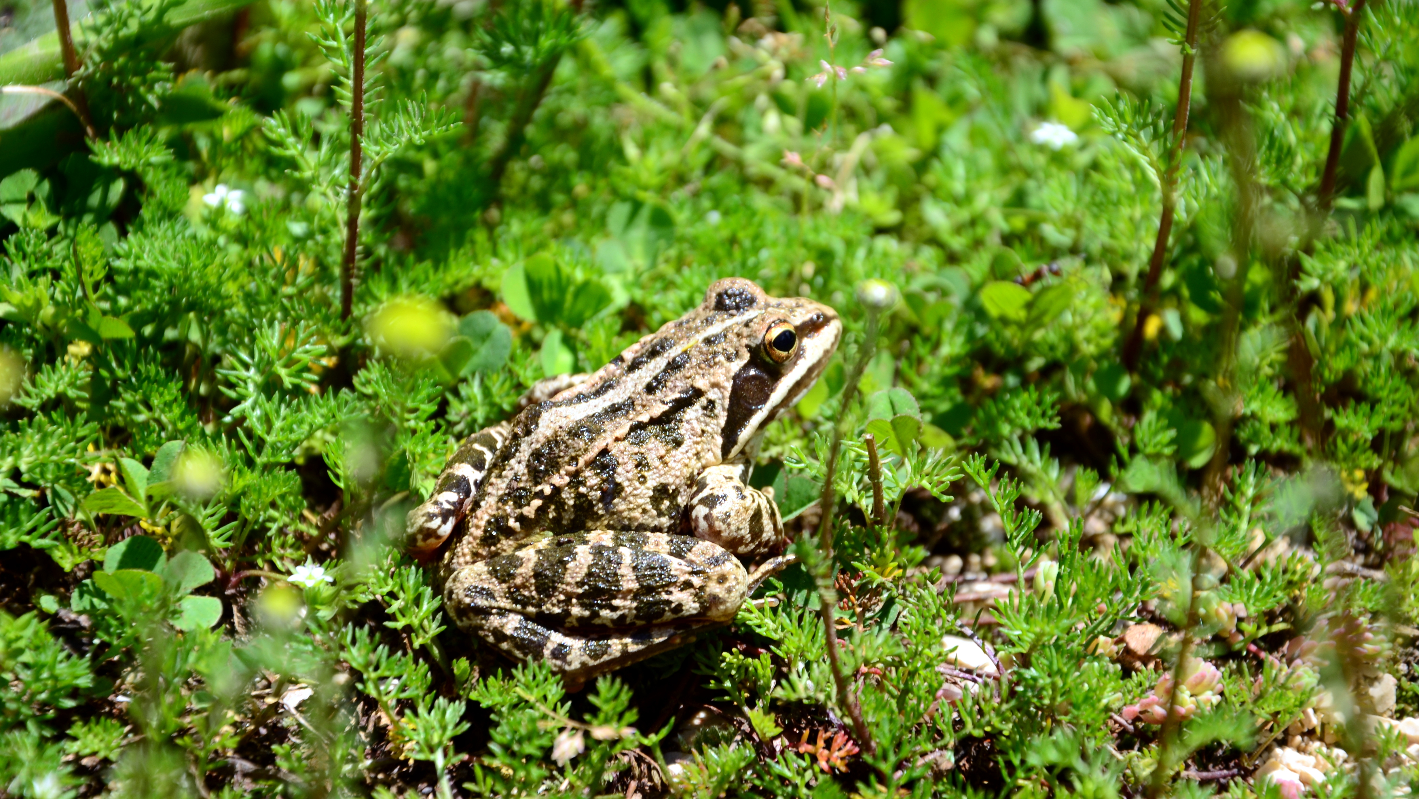 Pelobates syriacus